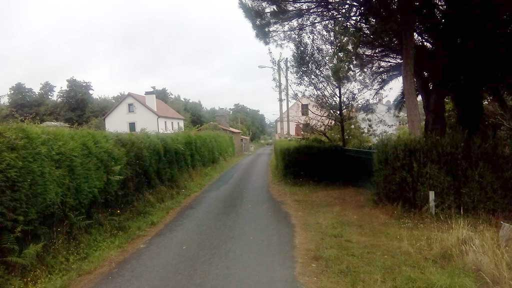 Vista da Cima da Vila, O Val.